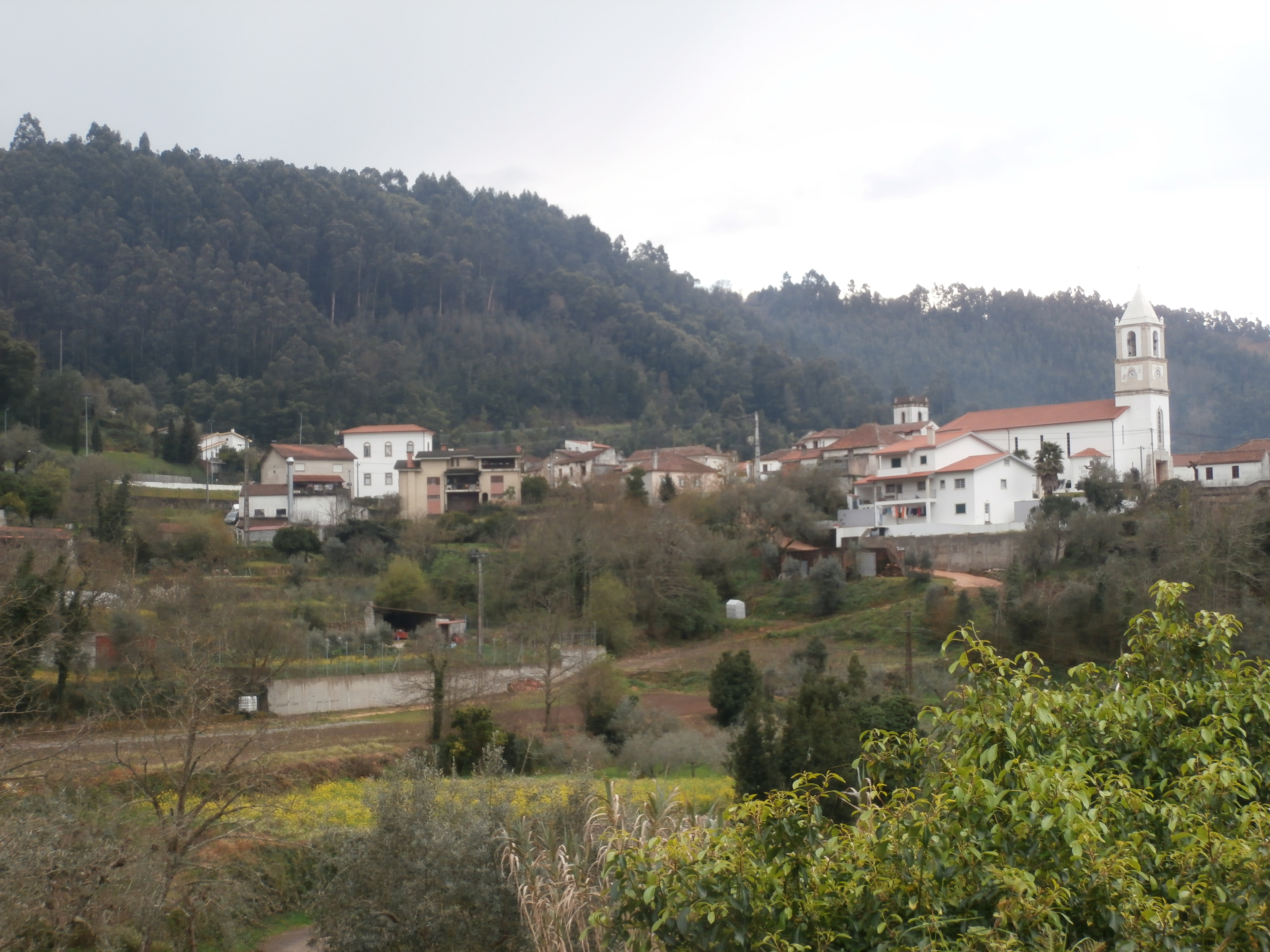 Vila Nova - Miranda do Corvo